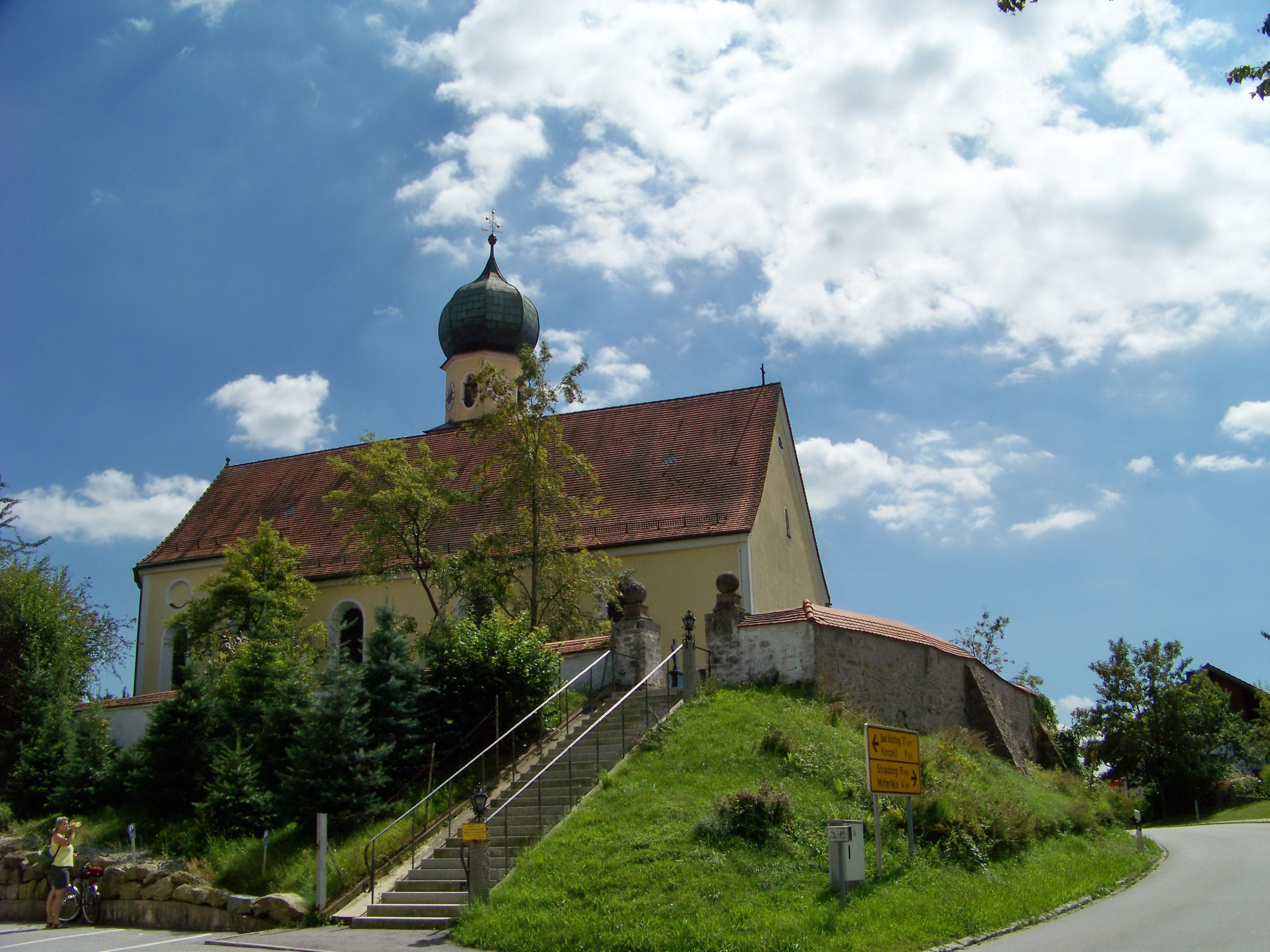 Haselbach, Straubinger Straße 17. Kirche St. Jakobus. Spätbarocker Bau 1713 ff.; mit Ausstattung. Turm an der Südseite des Langhauses. Der Turmoberbau ist achteckig. Über dem profilierten Hauptgesims thront die achtseitige Zwiebelkuppel.